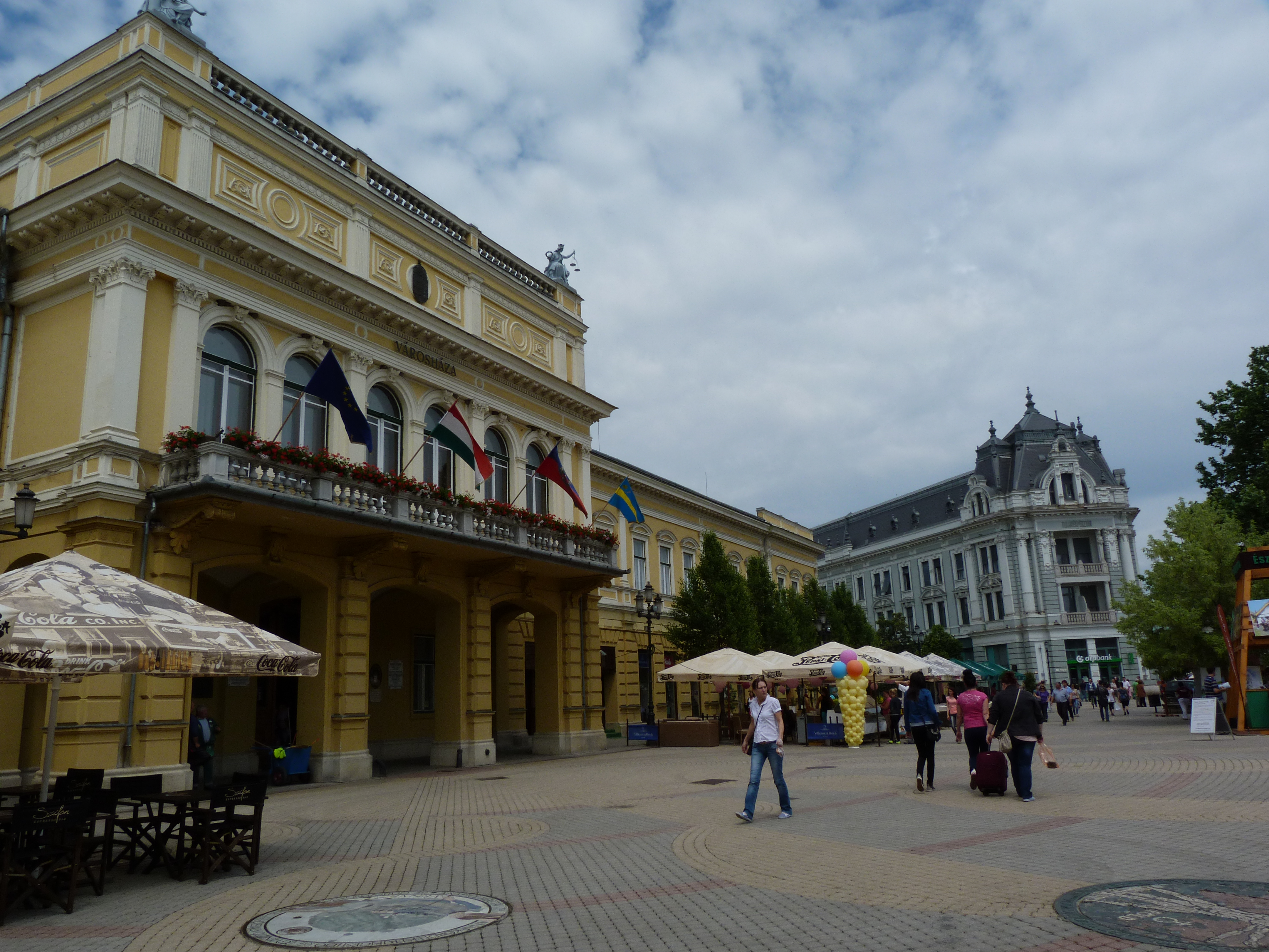 A felvétel 2013. Május 17 –én pénteken készült Nyíregyházán. ©© Derzsi Elekes Andor, Budapest, 2013, A kép és filmfelvételek egészben, vagy részletekben másolását, bármilyen úton történő sokszorosítását és felhasználását a szerző ellenérték nélkül, jogutódjaira is kihatóan megengedi. Az engedély kiterjed a kereskedelmi célú hasznosításra is. Kéri azonban nevének feltüntetését a felhasználás során. A Metapolisz sorozat valamennyi képe és filmje Creative Commons alatti valamint kereskedelmi - for profit - célra is felhasználható. Ajánlott hivatkozás: Derzsi Elekes Andor: Metapolisz DVD line